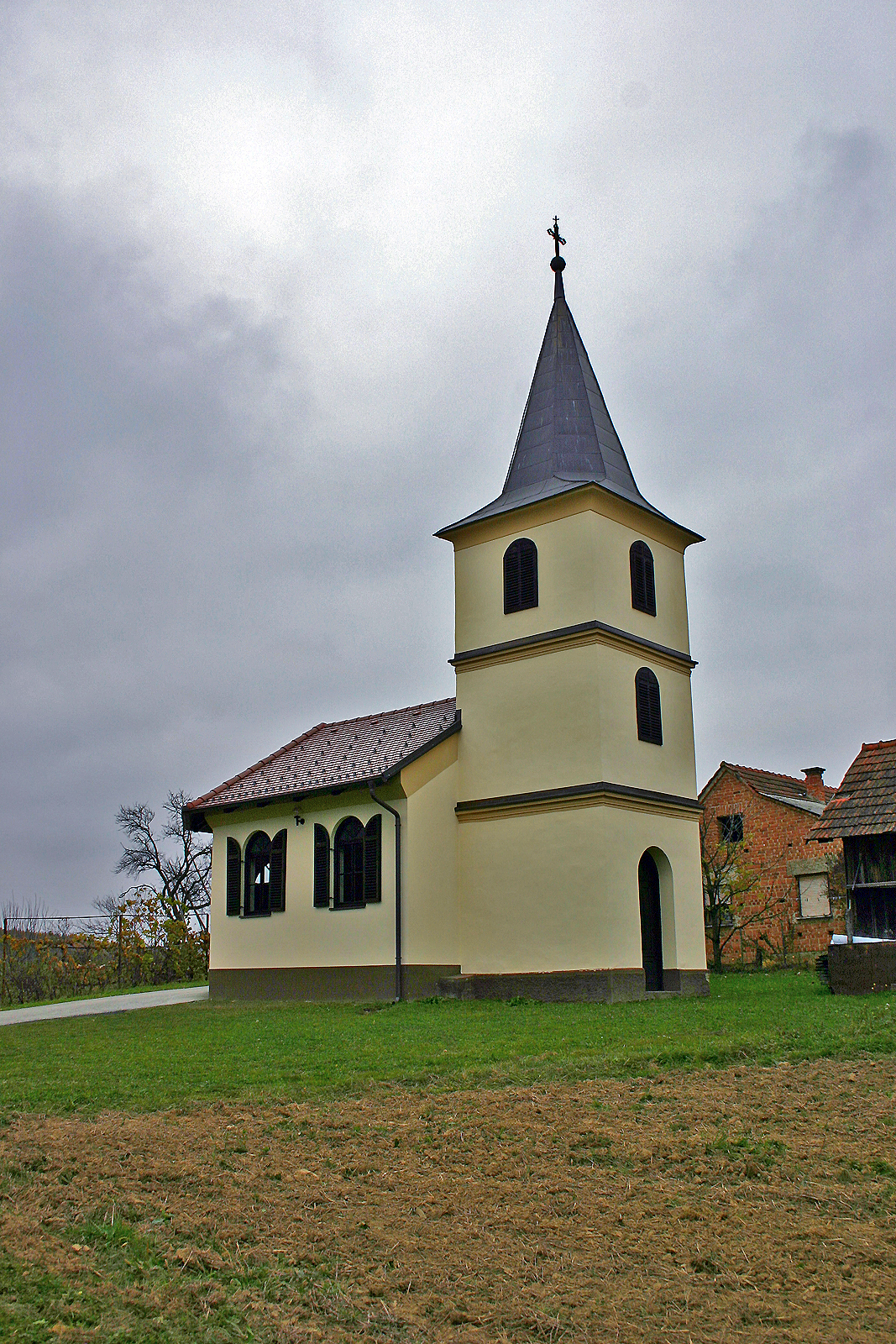 Kapela Poznanovci. Chapel Poznanovci. Die Kapelle, Poznanovci.